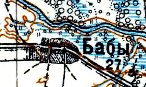 Топографическая карта Ленинградской области, квадрат Vc-29 (Батецкая), деревня Петровские Бабы